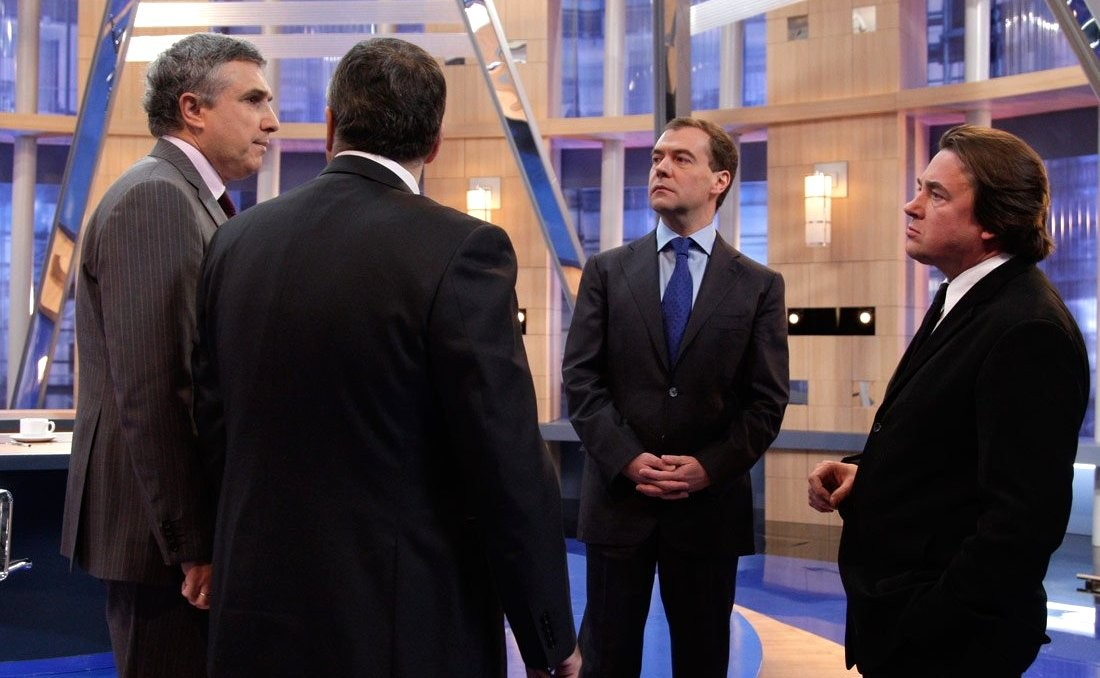 Дмитрий Медведев с руководителями российских телеканалов: слева направо Владимир Кулистиков, Олег Добродеев, Дмитрий Медведев, Константин Эрнст